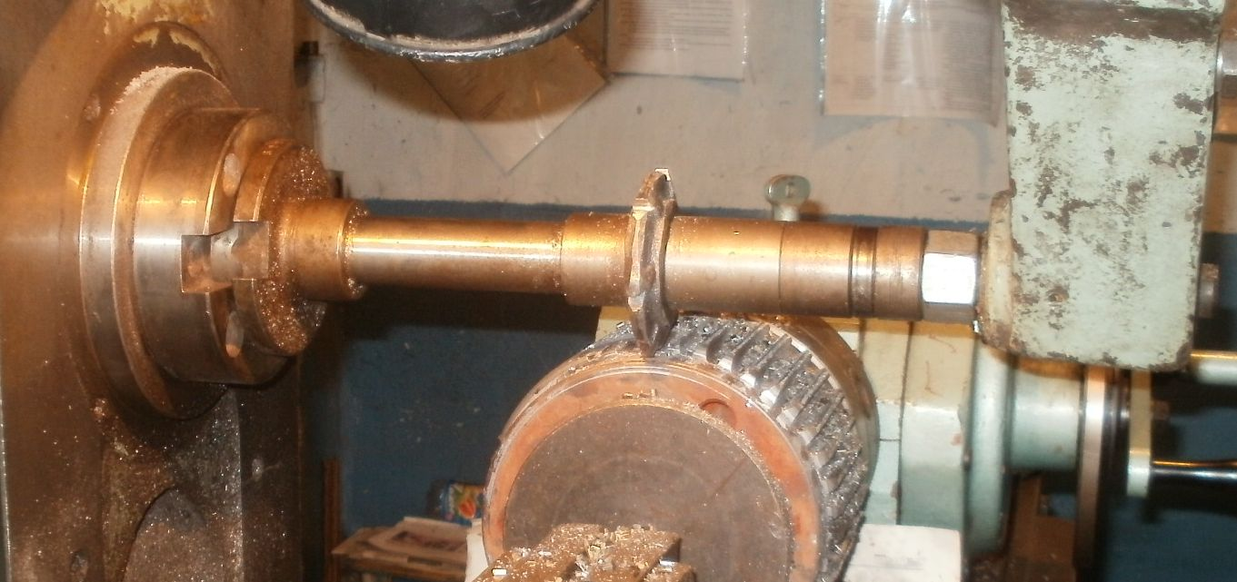 Нарезание шлицов